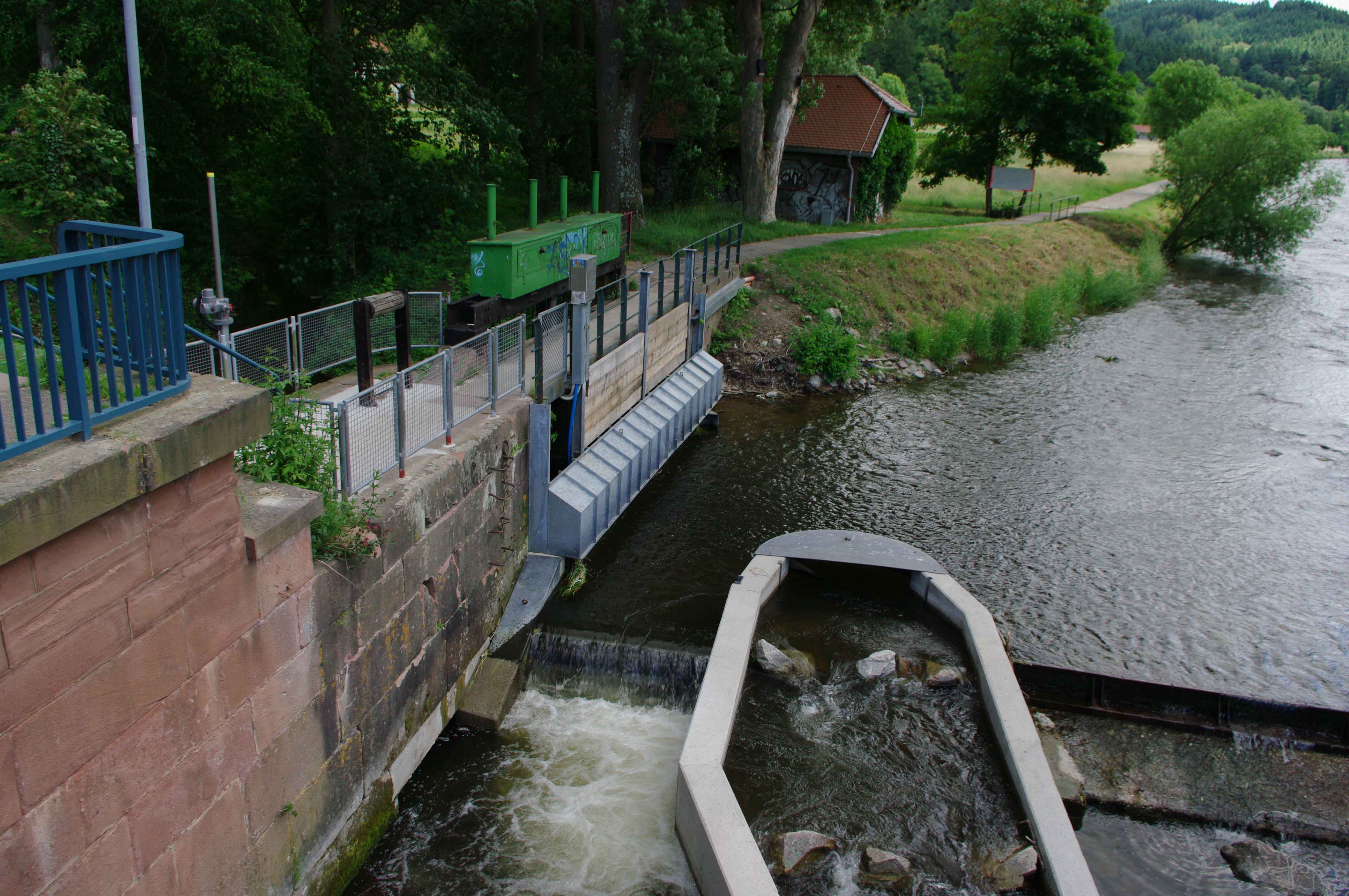 Die Neue Stellfalle am Sandfang